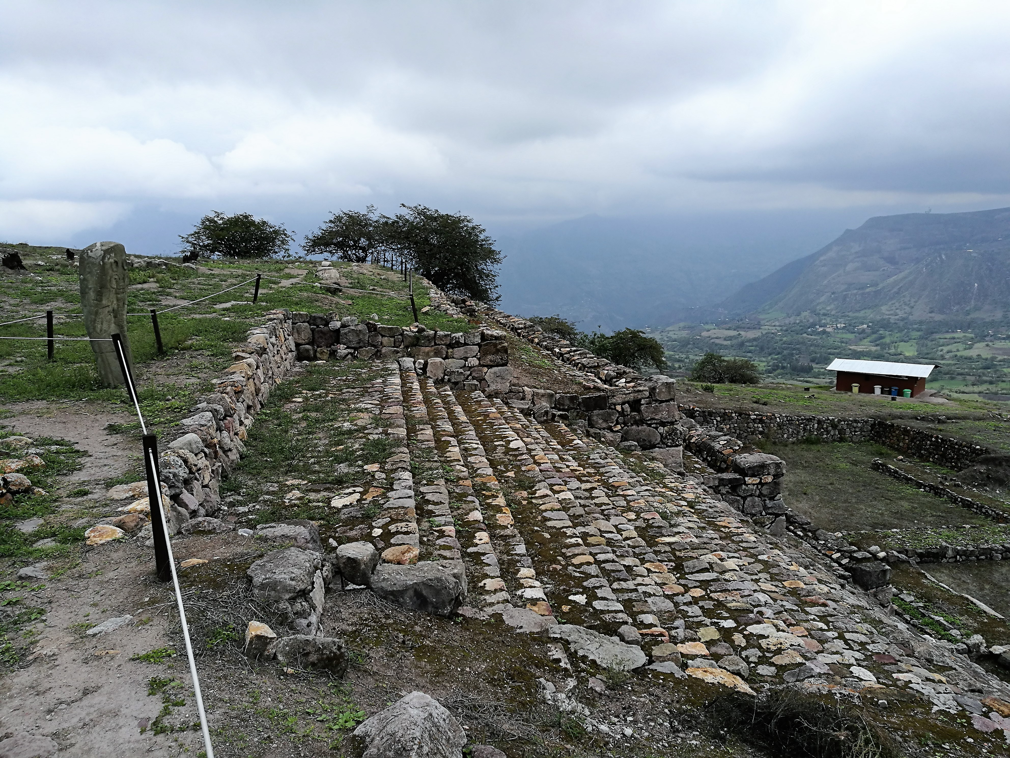 Grades des de la plataforma principal de Kuntur Wasi amb el monòlit principal a l'esquerra